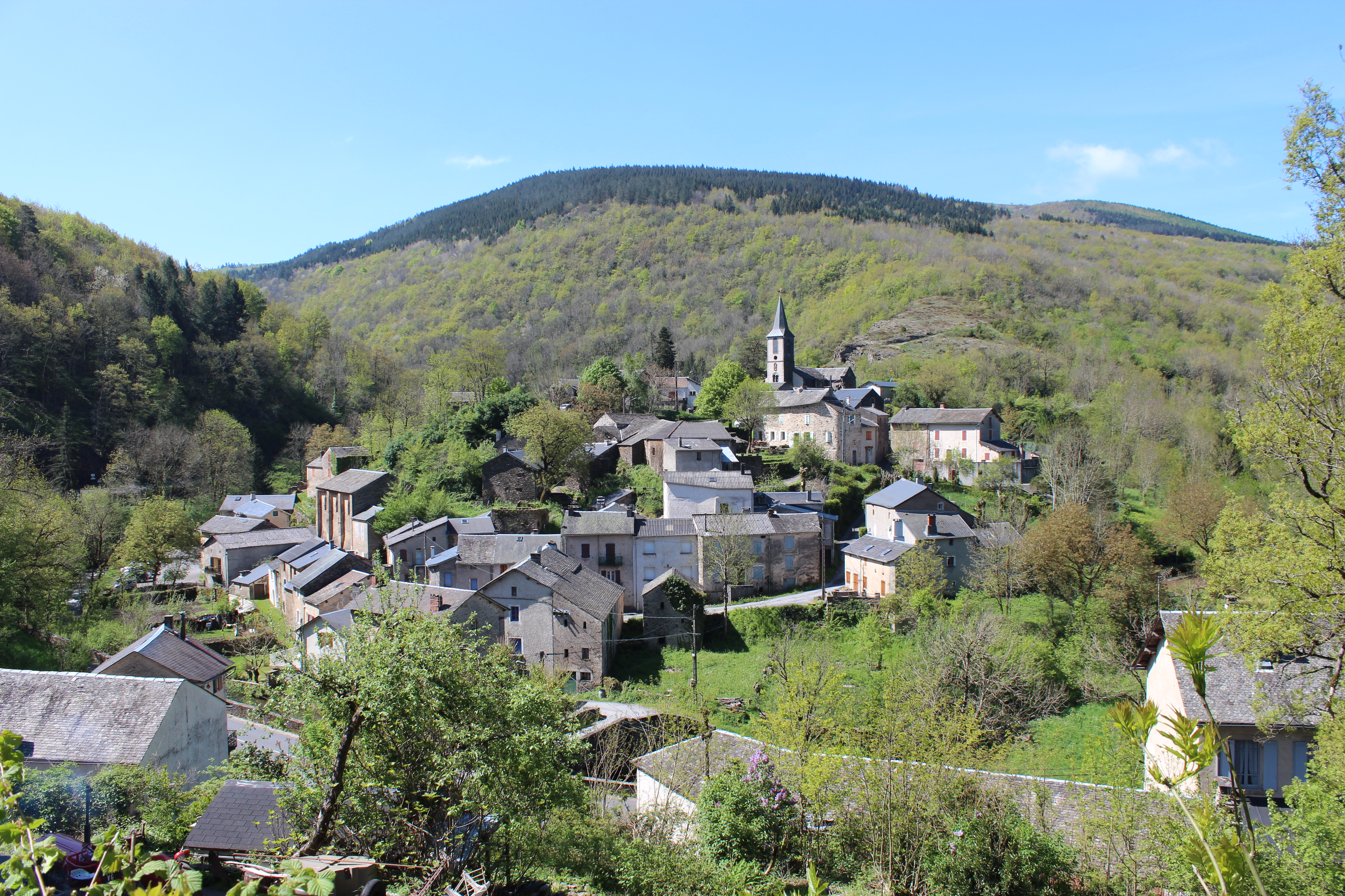 Vue générale du village de Gijounet